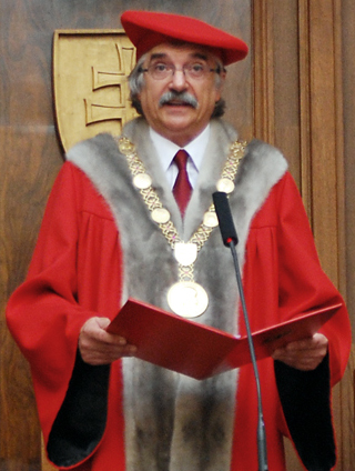 Karol Mičieta